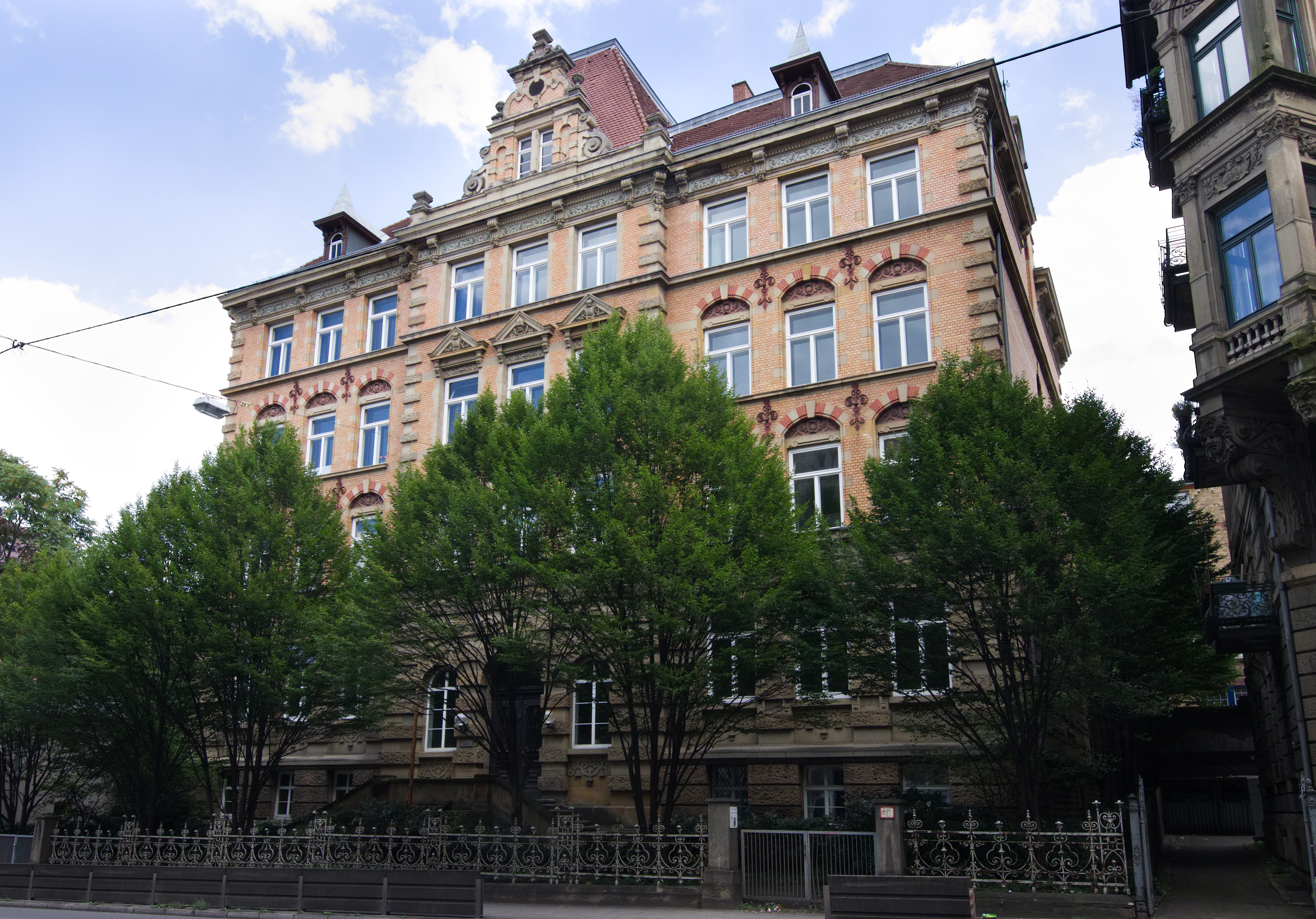 Römerschule in der Hauptstätter Straße 139 in Stuttgart. Erbaut 1889-1890 von Emil Mayer im Stil der deutschen und italienischen Neorenaissance. Geschützt nach § 2 DSchG.